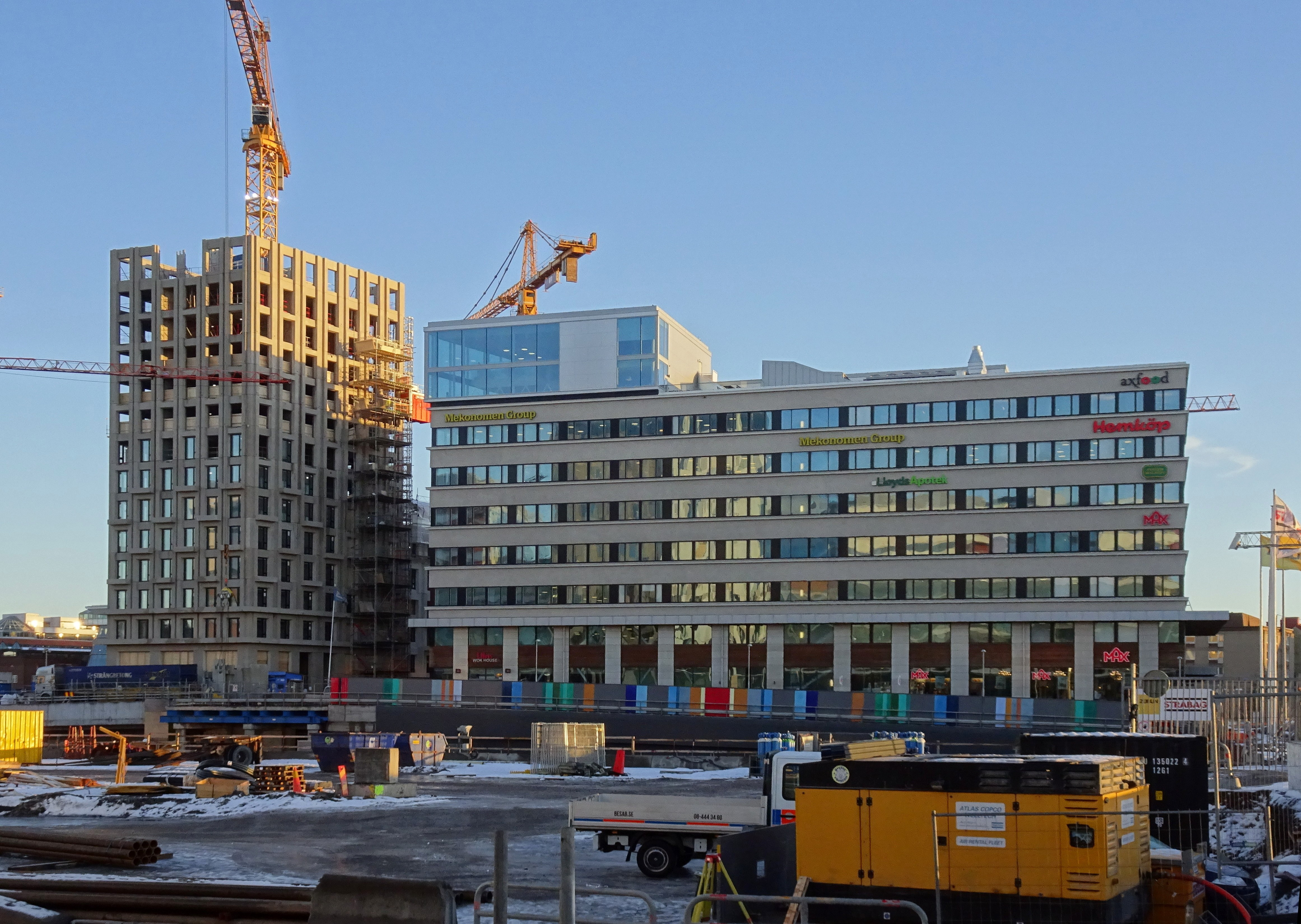 Hagastadens nya bebyggelse på Stockholmssidan. T.v. nybygget för Haga Nova i kvarteret "Cellen", t.h. kvarteret "Fraktalen".